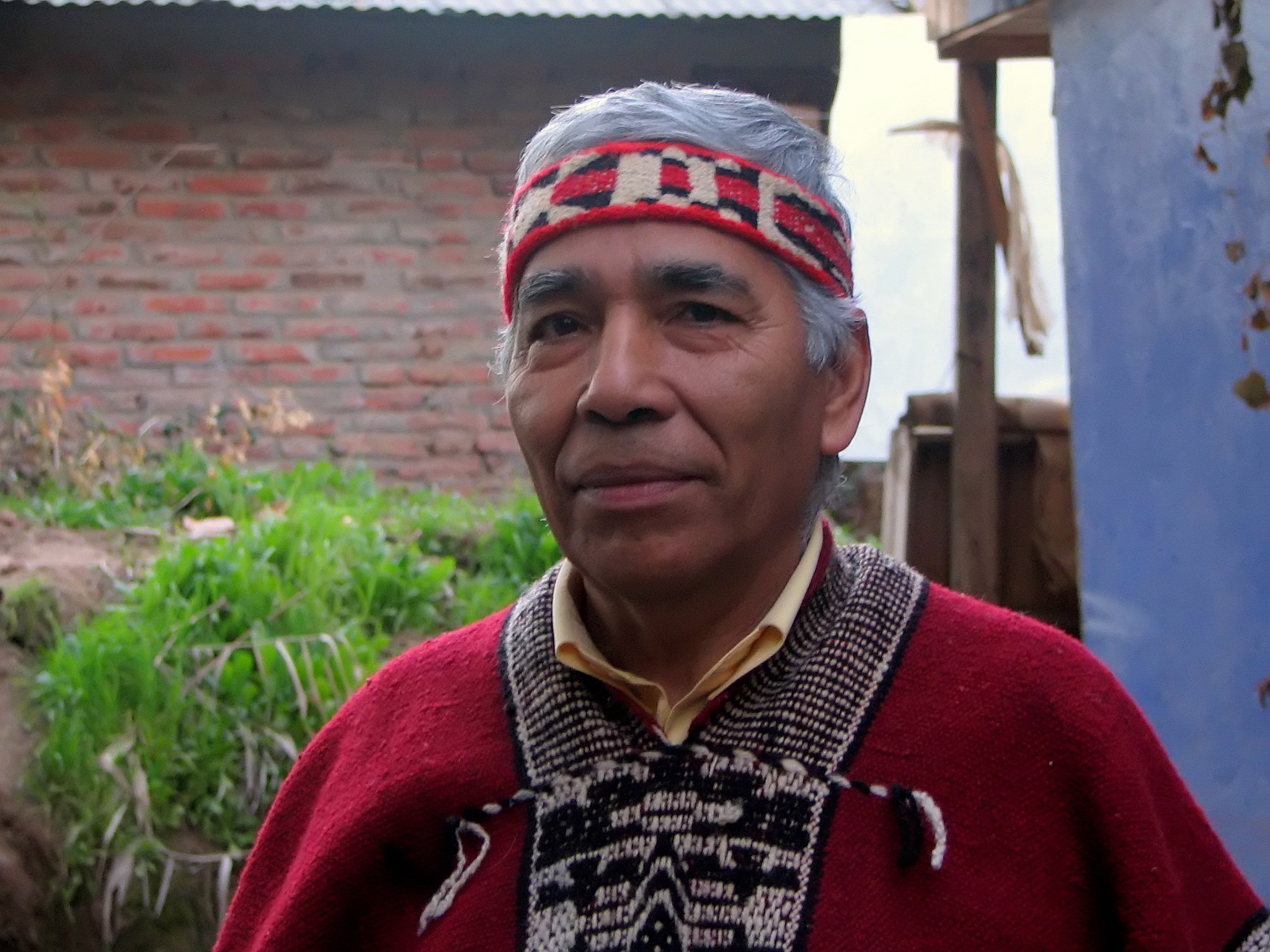 Robinson Carimán, hombre mapuche de Talca, Chile